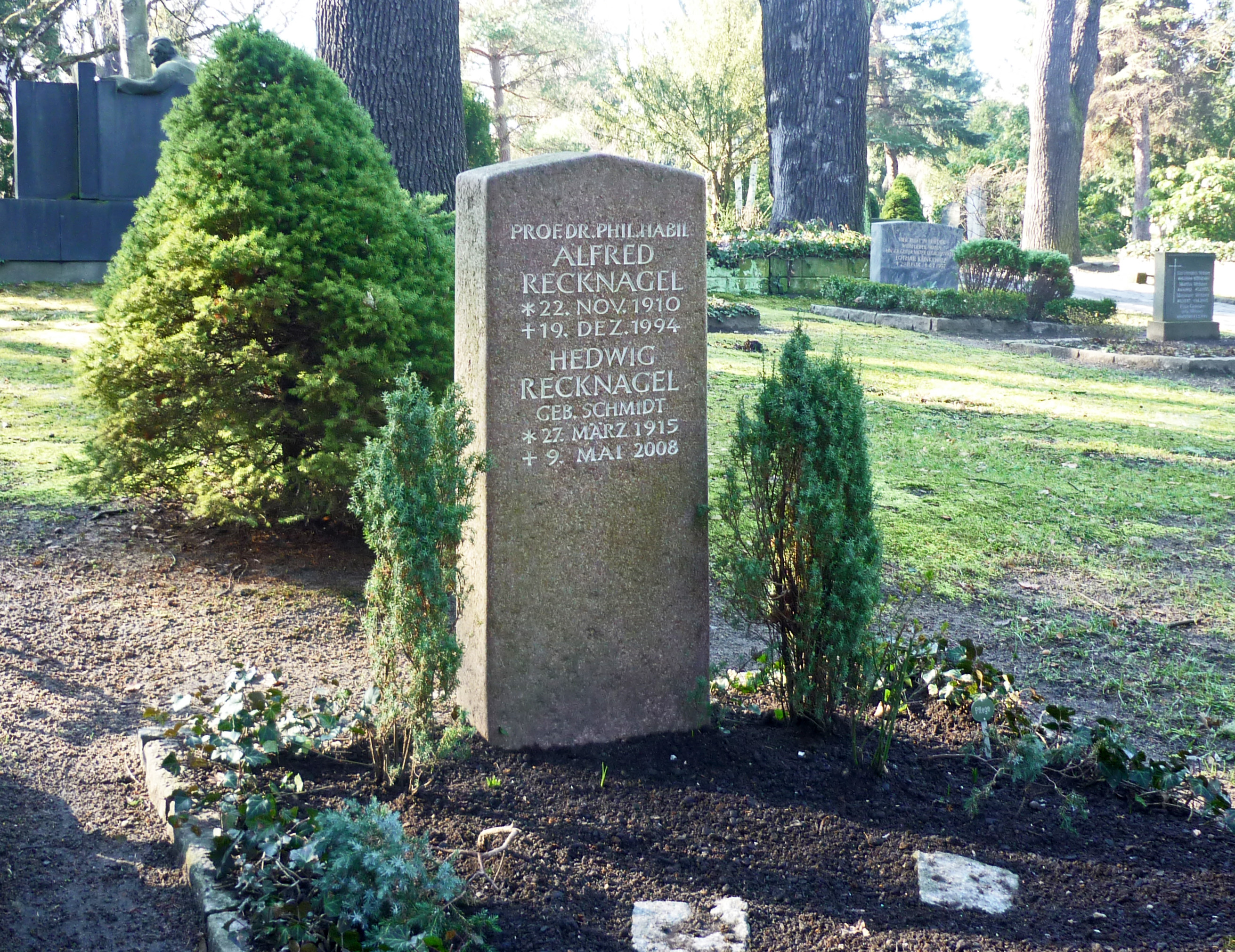 Grab von Alfred Recknagel (1910–1994), Physiker, Prof. an der TU Dresden, auf dem Trinitatisfriedhof in Dresden